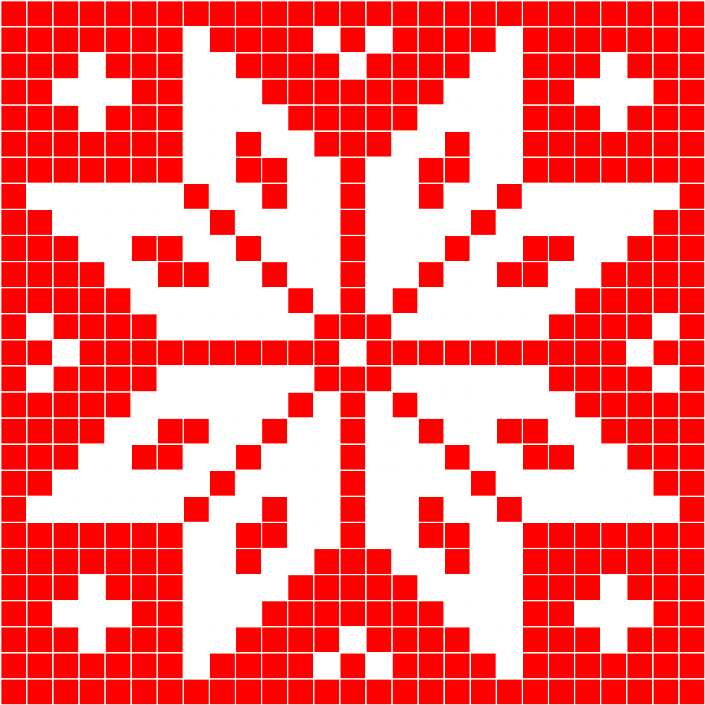 Motif tricot norvégien, rose Selbu rouge et blanc